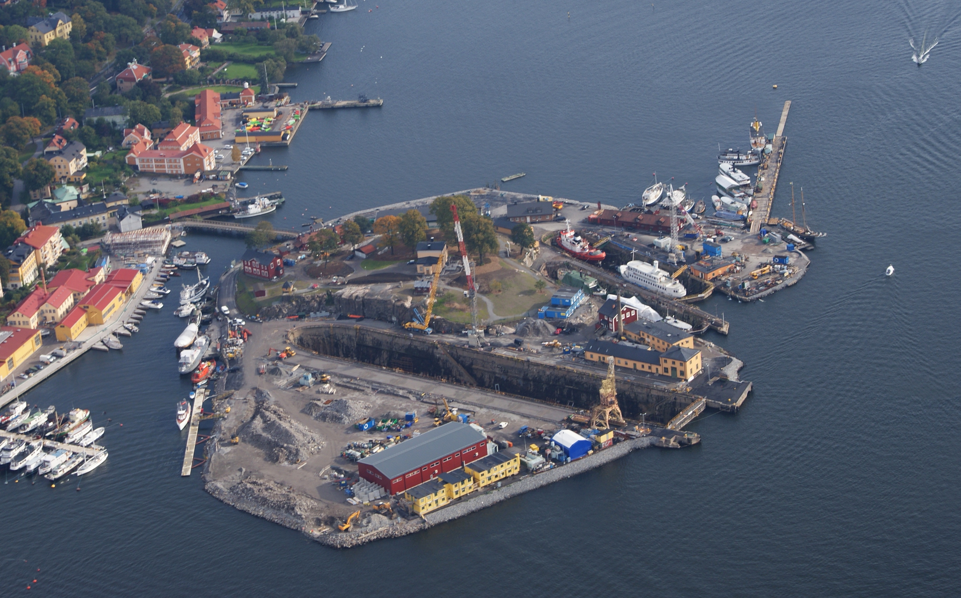 Beckholmen sedd från helikopter.